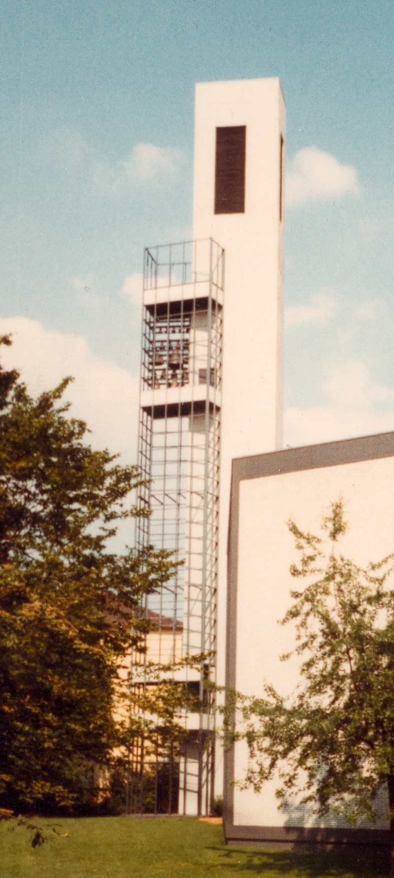 Carillon der Melanchthonkirche Düsseldorf Grafenberg